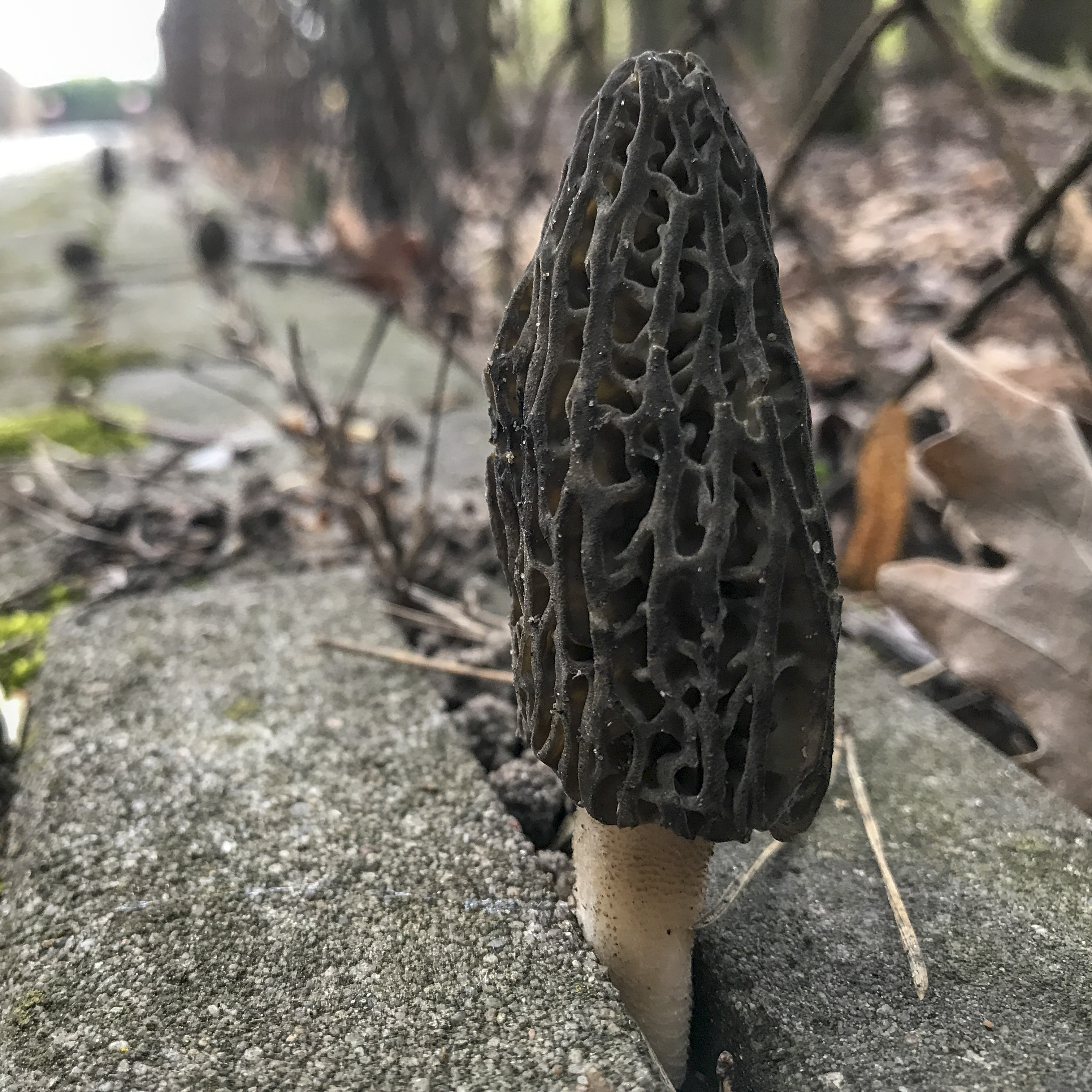 Morchella elata Smardz wyniosły na drodze w okolicach Łodzi